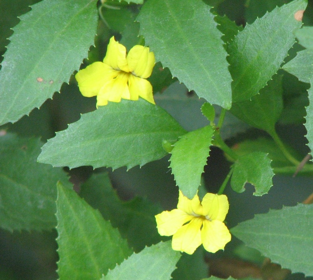 Goodenia ovata(unlabelled), Royal Botanic Gardens, Melbourne